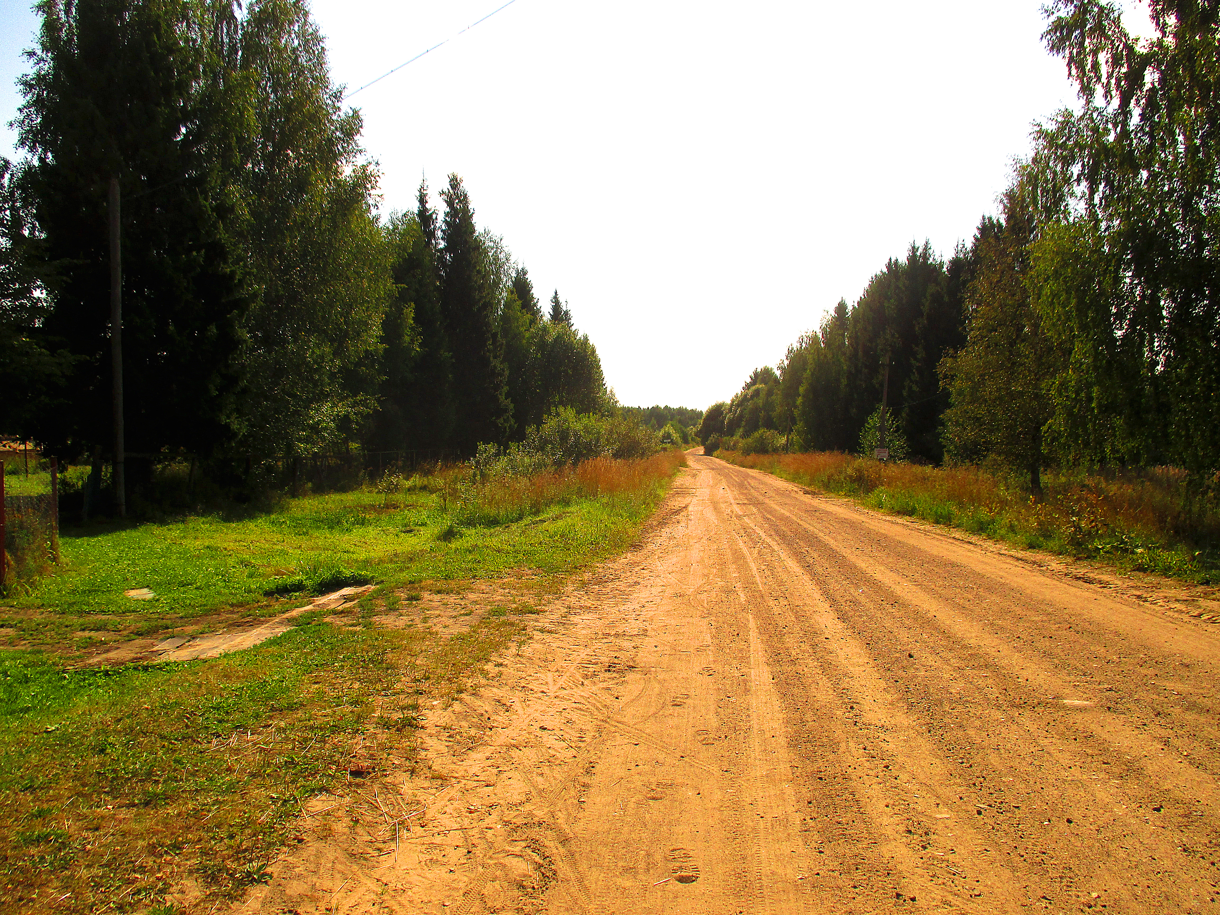 Грунтовая дорога в деревне Володарское